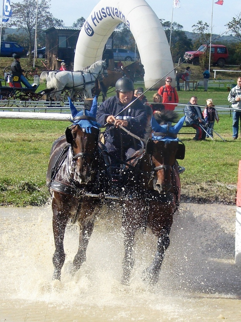 Závody ve spřežení koní - Lipiny